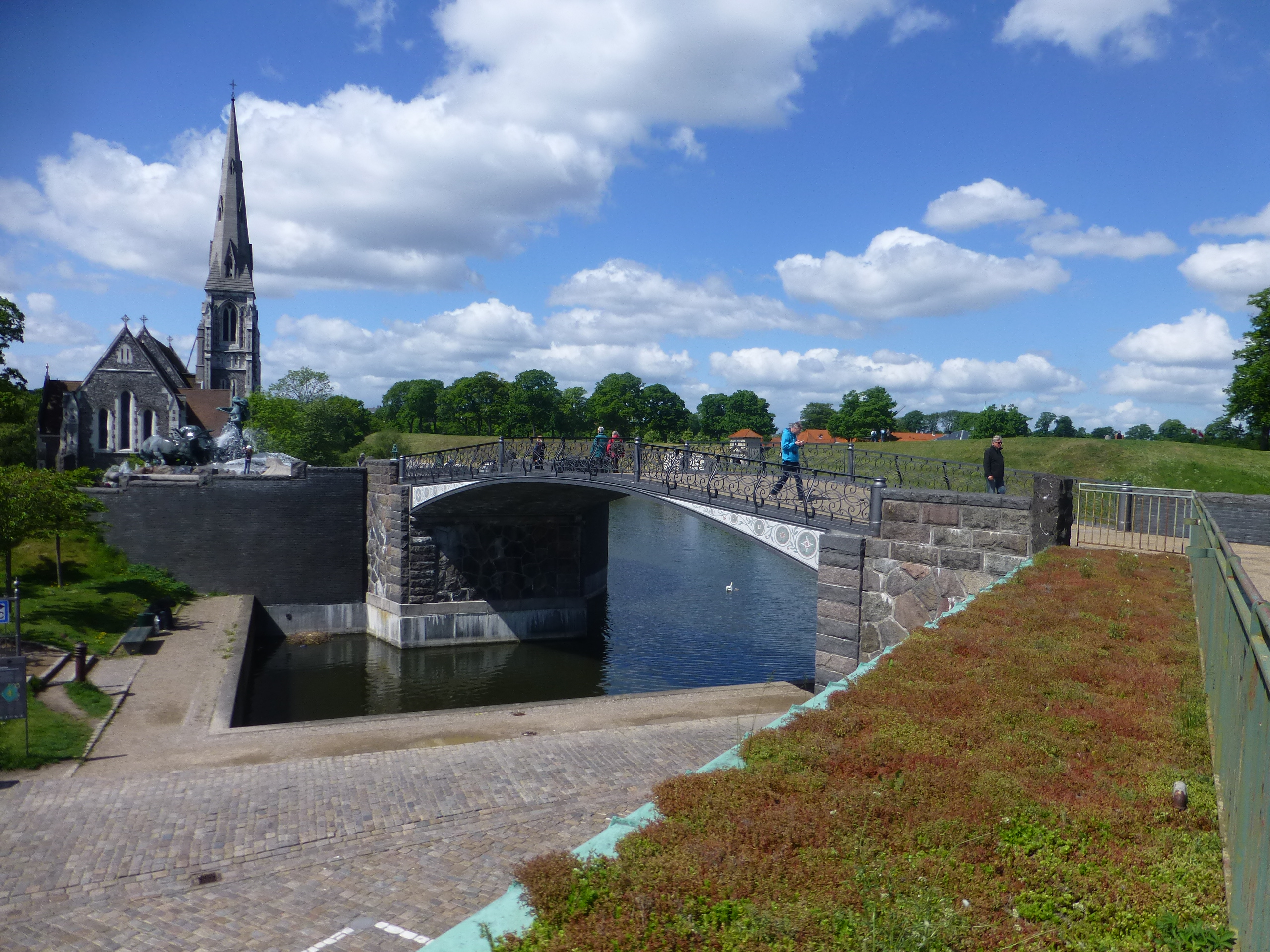 The bridge Gefionbroen in Copenhagen.